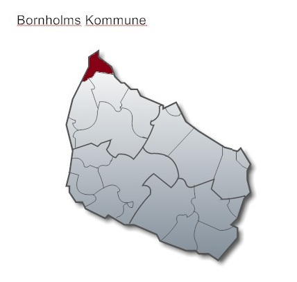 Allinge Sandvig Sogn